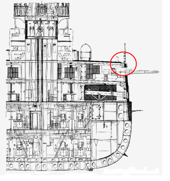 Trancanil